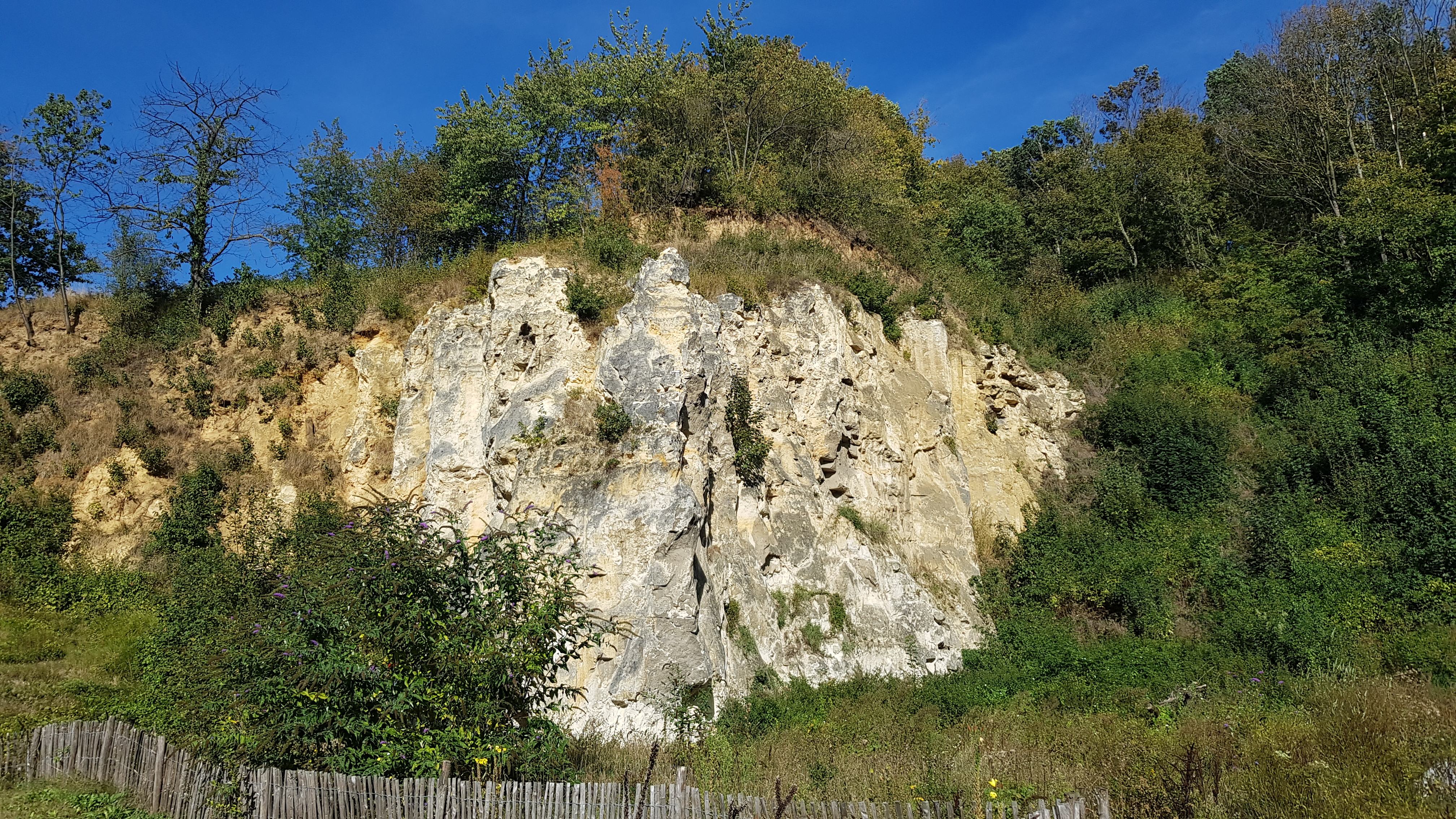 Groeve van der Zwaan, Maastricht, Nederland